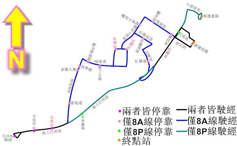 中文（香港）: 九巴8A線及8P線的走線圖，當中藍線表示只有8A線駛經，而藍綠線則表示只有8P線駛經